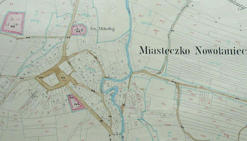 mapa katastralna miasteczka Nowotaniec z roku 1852, foto marek silarski